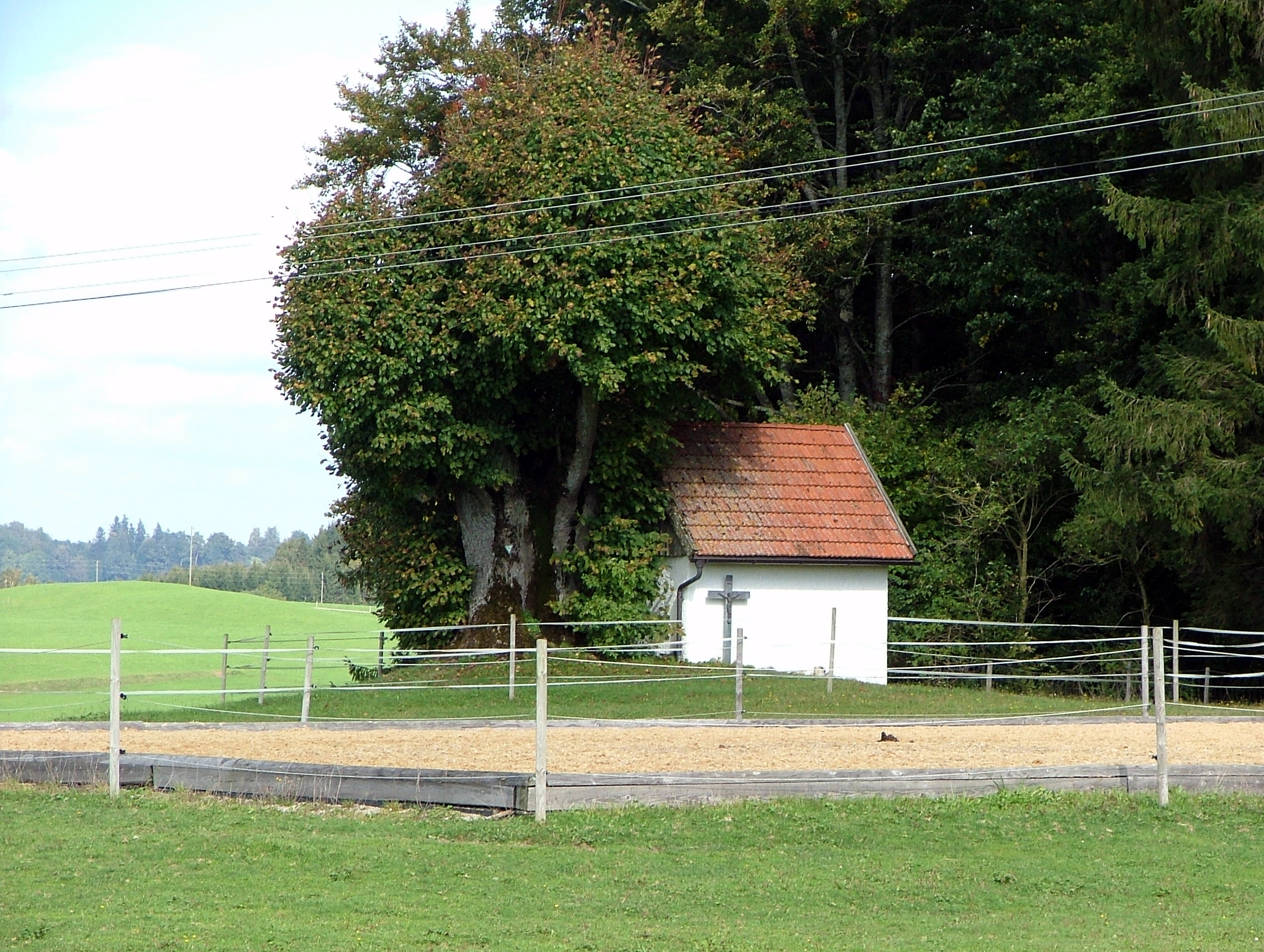 Kapelle